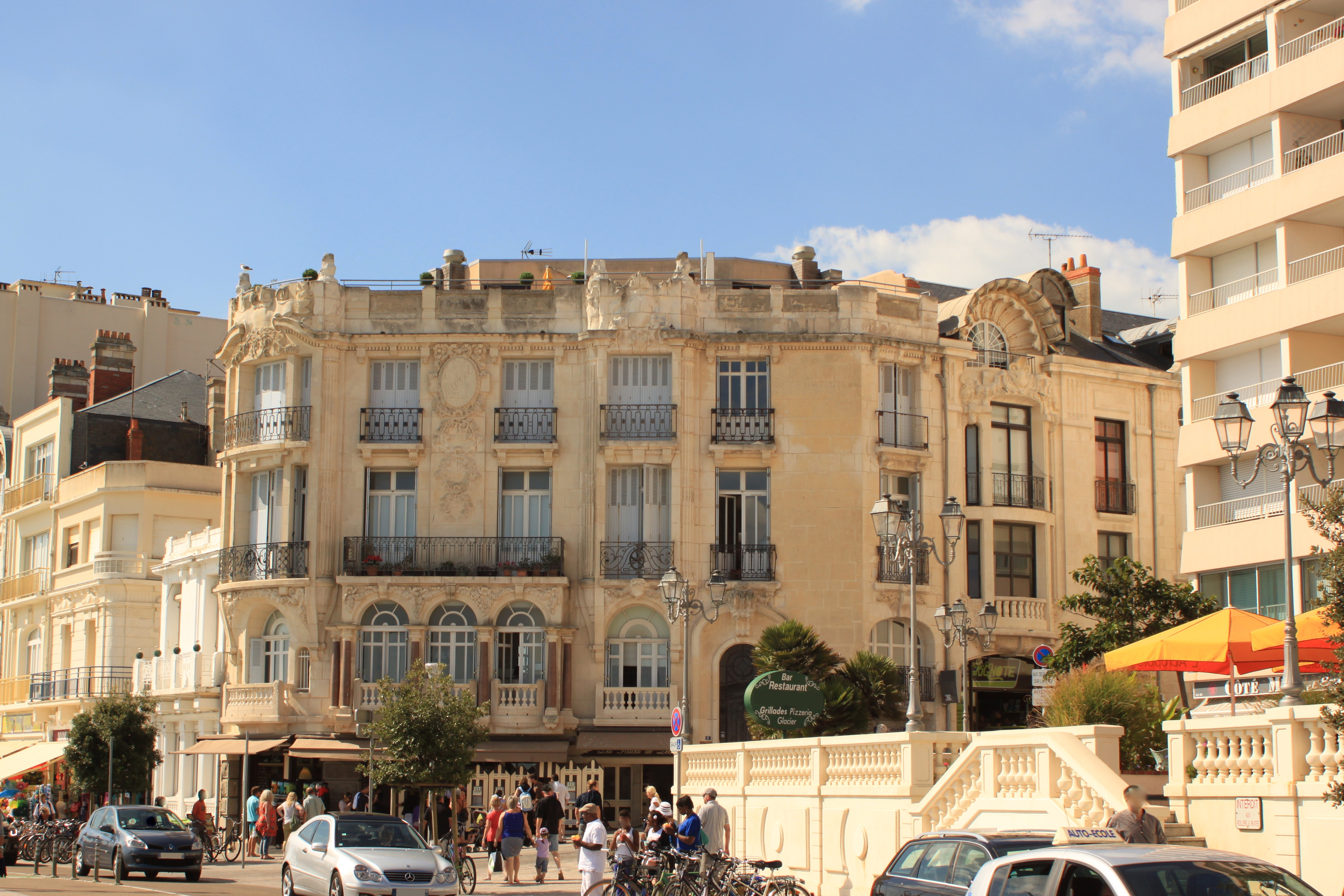 Villa Mirasol, Fr-85-les Sables-d'Olonne.